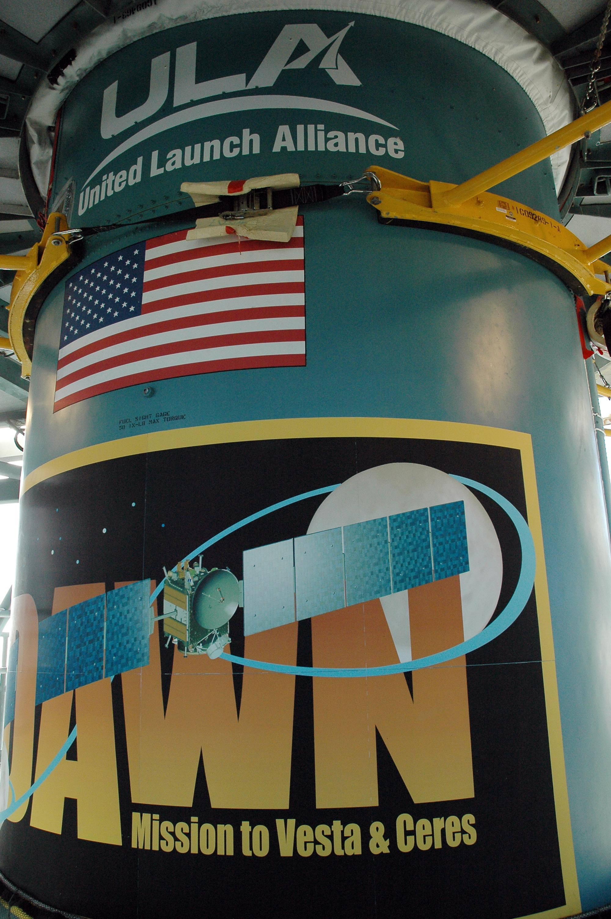 Logo der „ULA“, die Flagge der „Vereinigten Staaten“ und das Missionslogo der Dawn Raumsonde (von oben nach unten) an der ersten Stufe von Dawn′s Delta-II-7925H-Rakete.